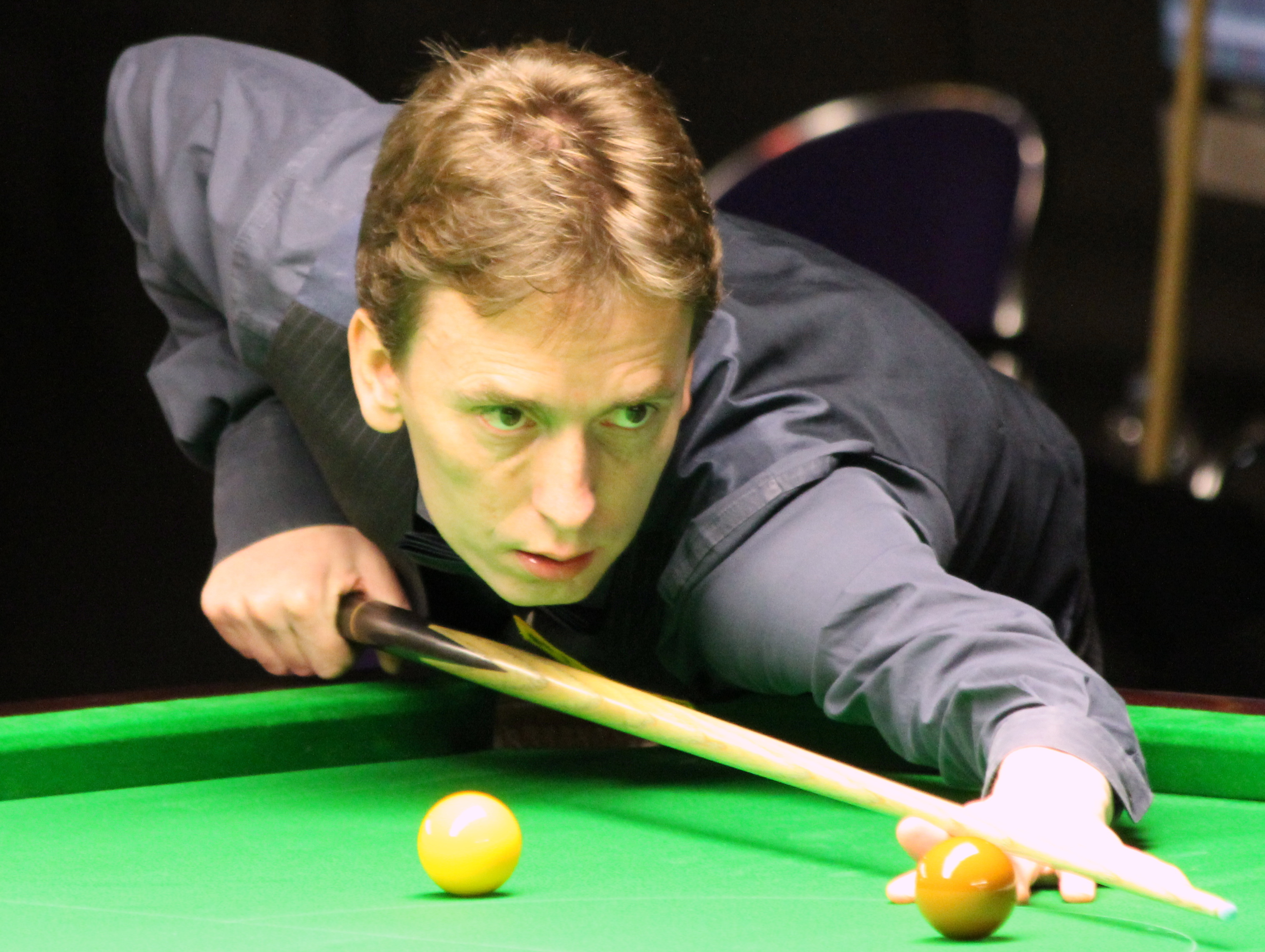 Ken Doherty beim Paul Hunter Classic 2012